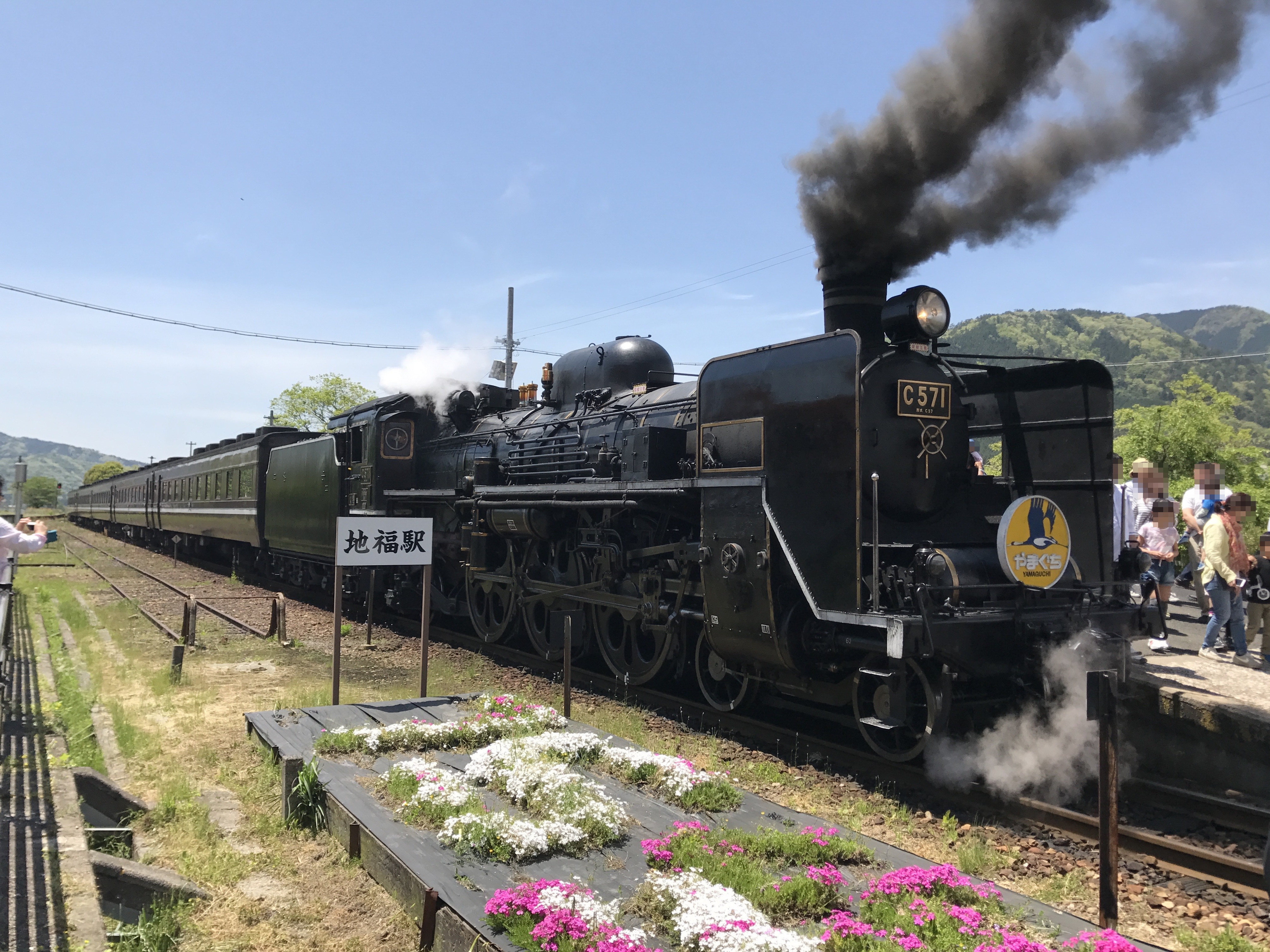 地福駅にて停車中の特急「SLやまぐち号」